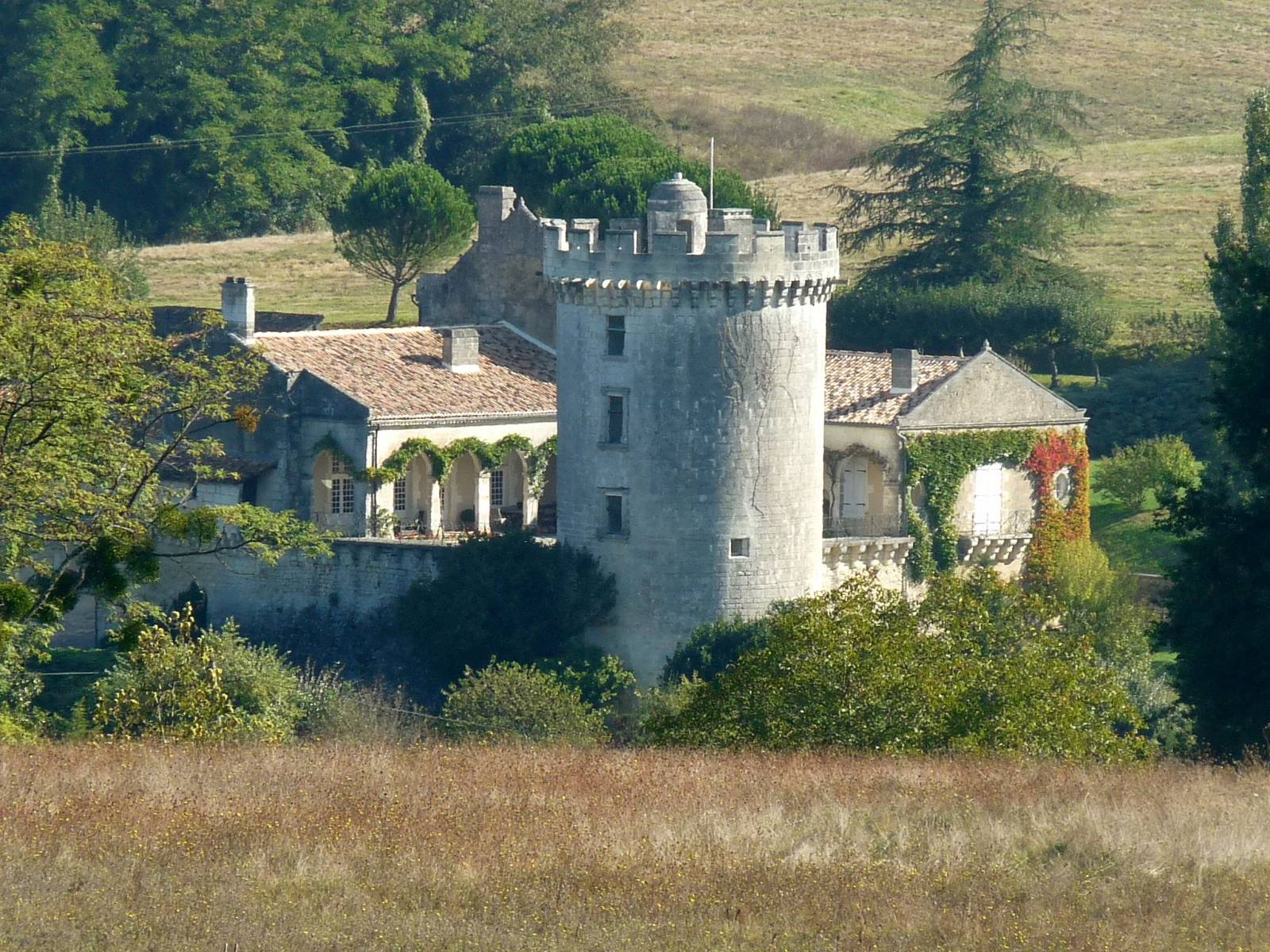 château du Repaire à Rougnac (16), France